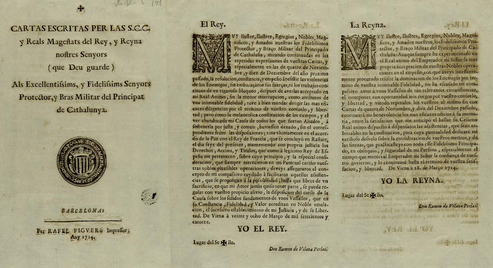 Carta de Carlos de Austria anunciando el Tratado de Rastatt al Protector y oficiales del Brazo Militar de Cataluña 1714